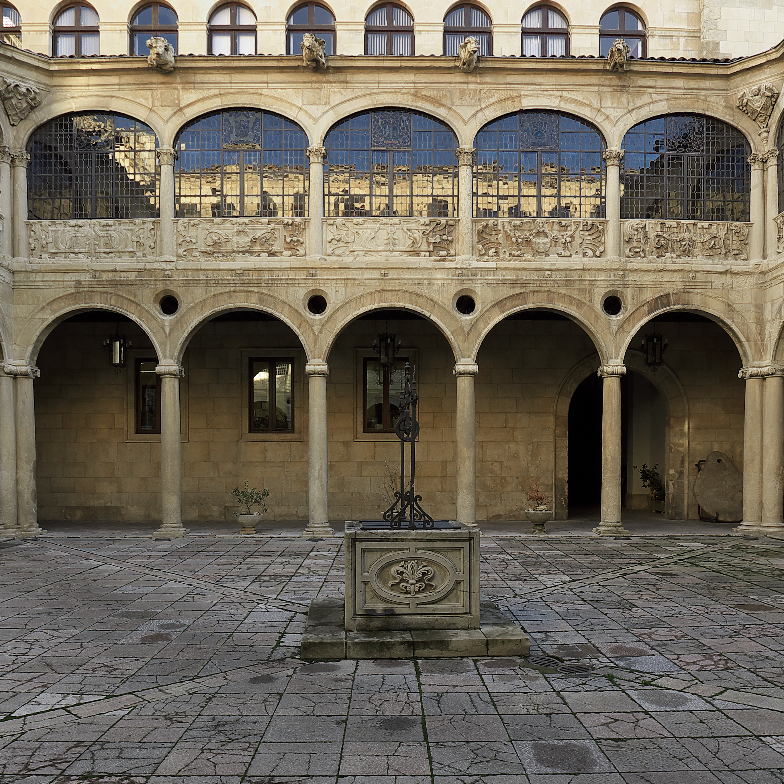 Ramiro Núñez de Guzmán contrata a Rodrigo Gil de Hontañón las trazas de un palacio en León (1558-1566).